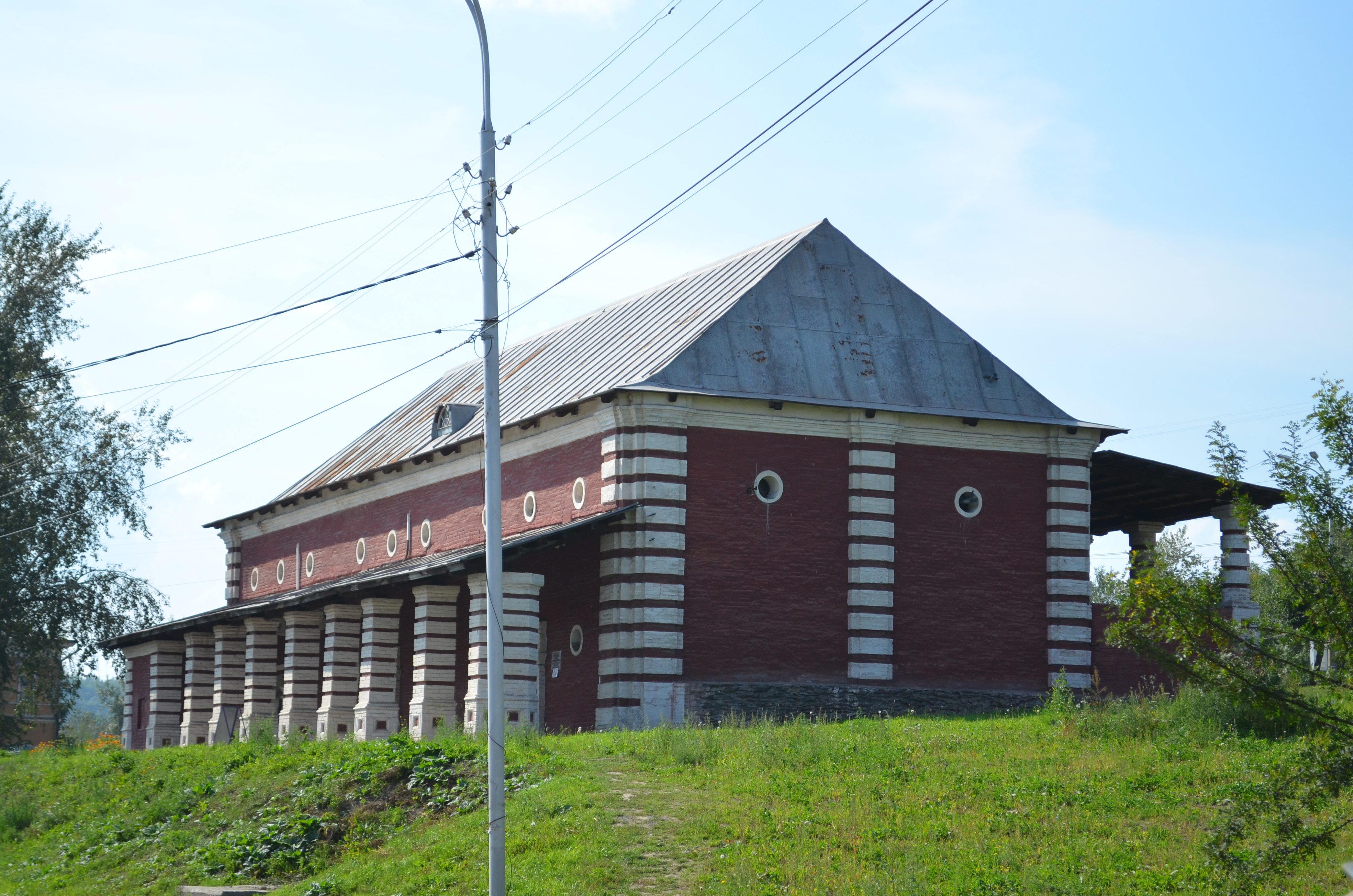 Верхний провиантский склад (Свердловская область, Нижний Тагил, улица Уральская, 1а/1)